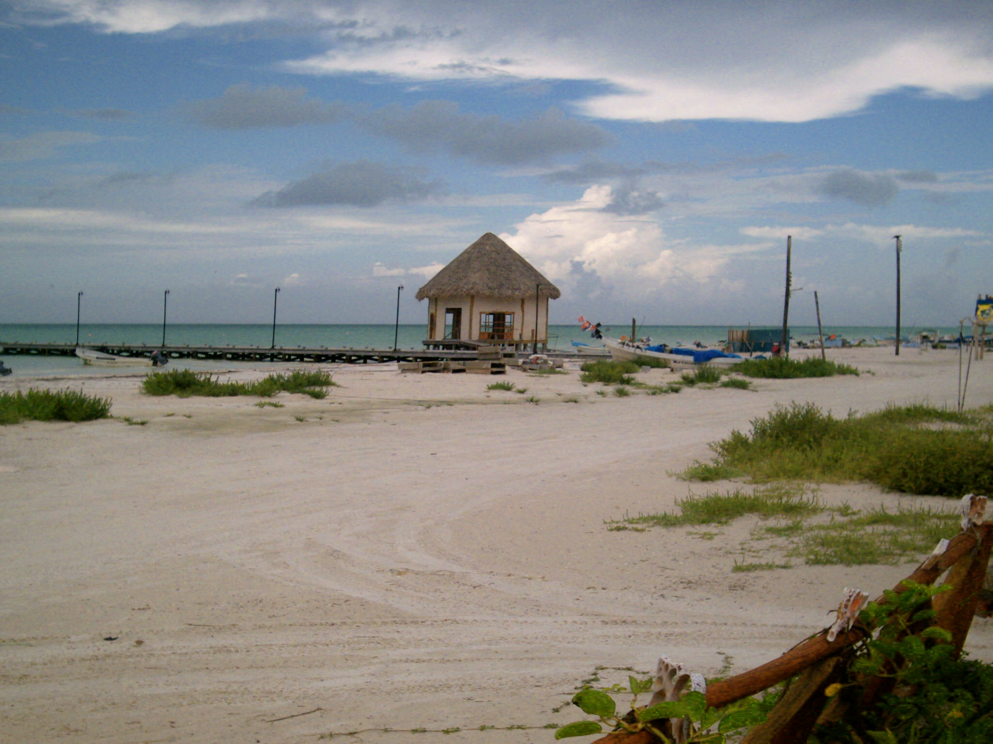 Imagen de las paradisiacas playas de la isla de [( Holbox )]